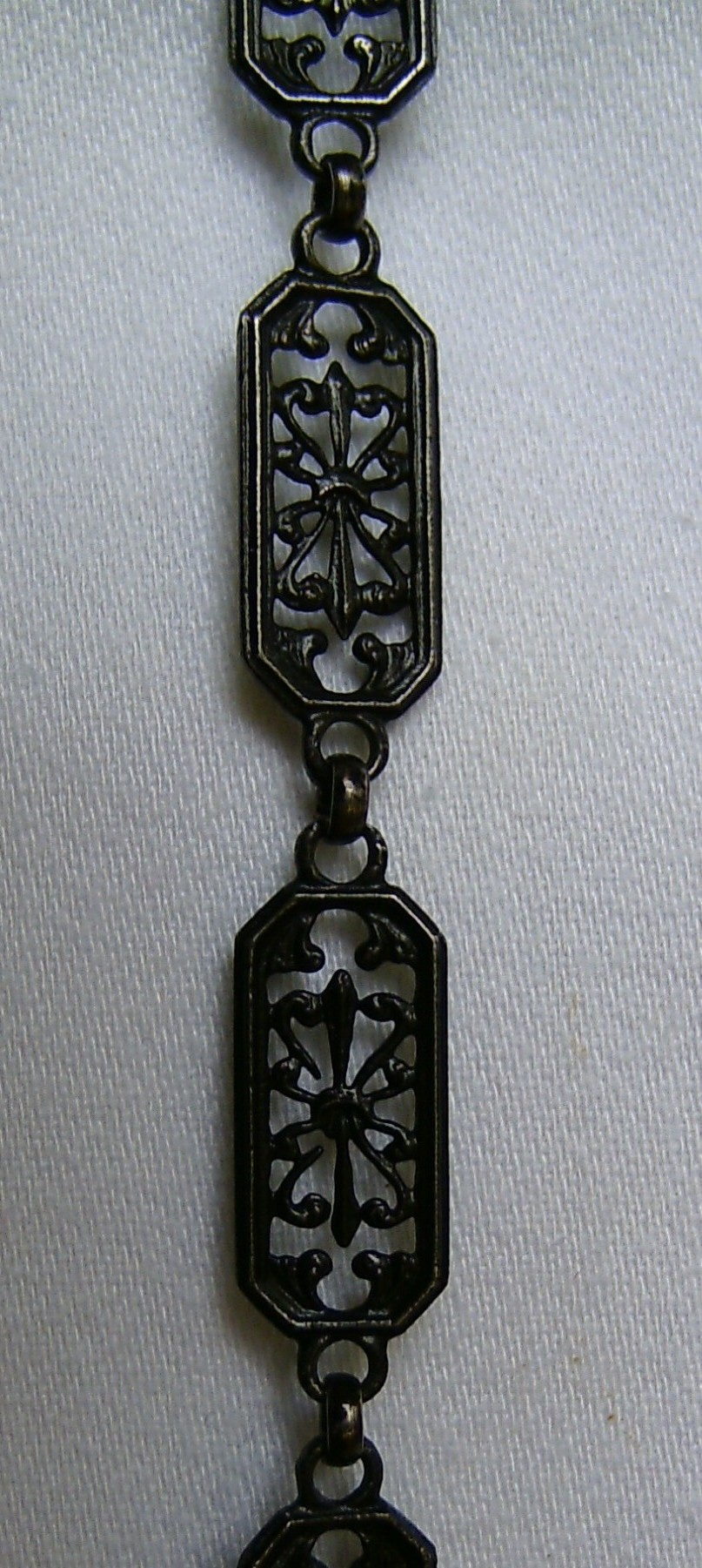 Conrad Geiß, Zwei Glieder einer Halskette aus der Werkstatt von Conrad Geiß, Maße pro Kettenglied: Länge: 28 mm , Breite: 12 mm